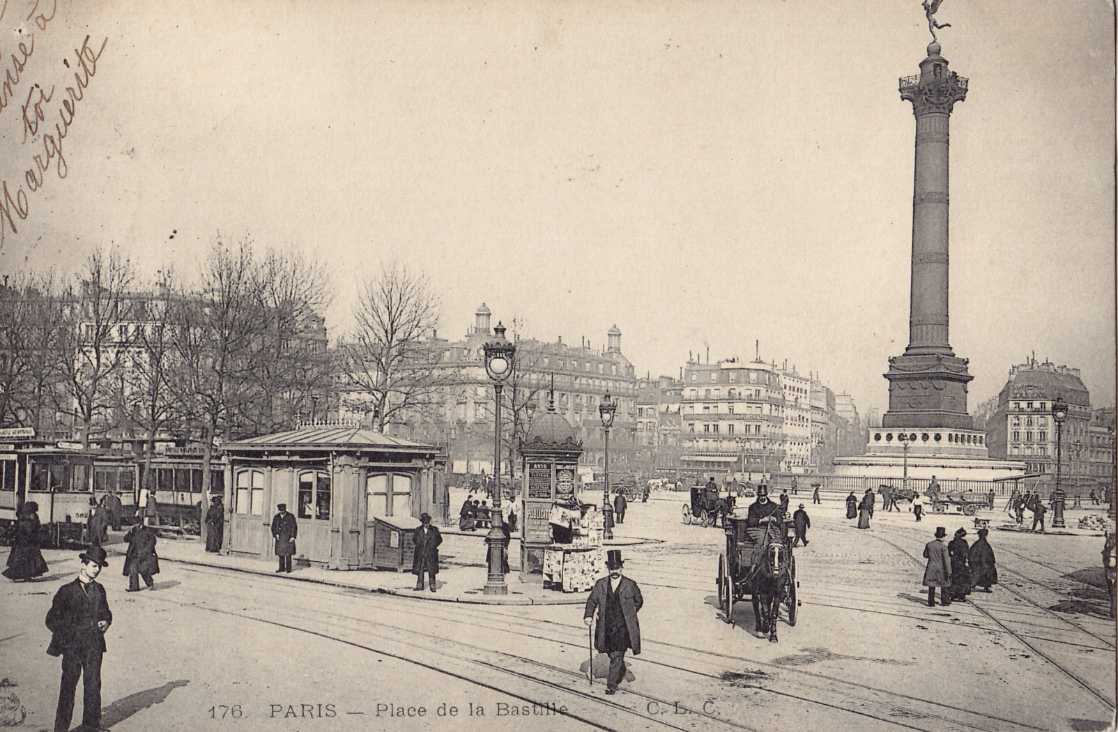 Carte postale ancienne éditée par CLC, n°170 :PARIS - Place de la Bastille